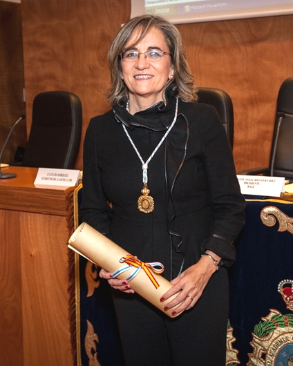 María José Alonso Fernández (Q19799496)